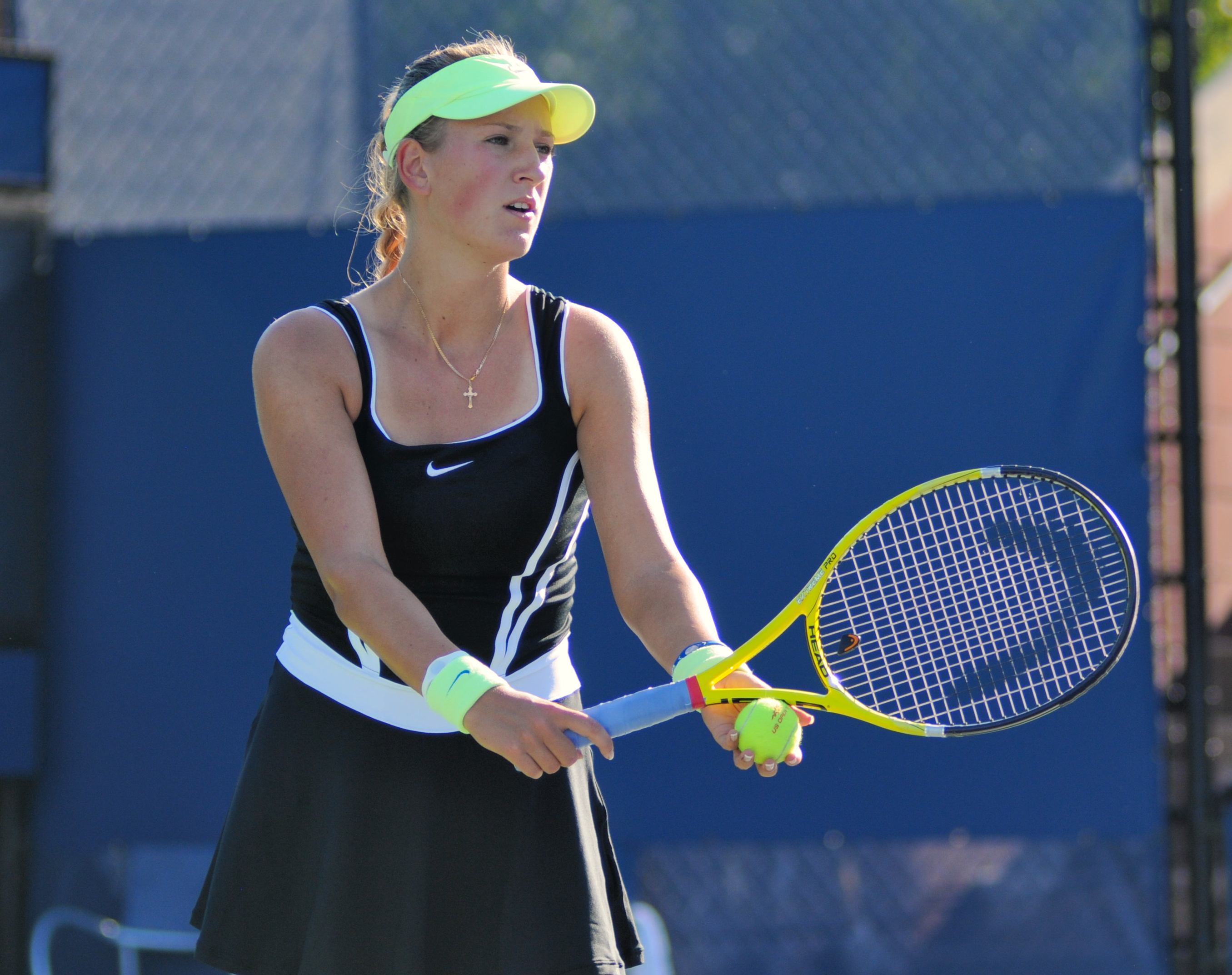 Victoria Azarenka - US Open 2010